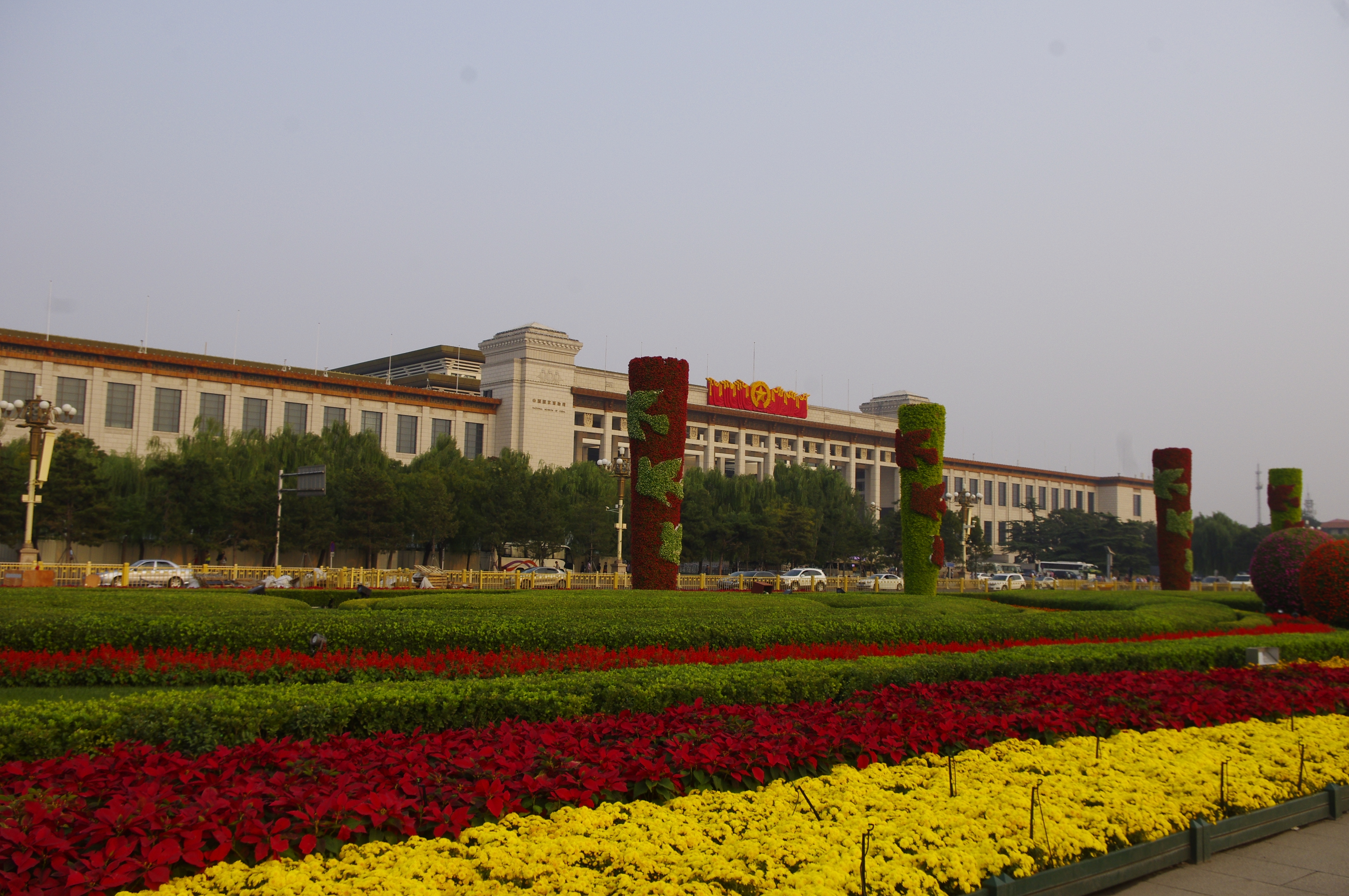 The making of this document was supported by Wikimedia Polska. To zdjęcie zostało wykonane podczas Wikiwyprawy 2015. Wszystkie zdjęcia z wyprawy możesz zobaczyć w kategorii: Wikiwyprawa 2015. English | polski | +/− To zdjęcie zostało załadowane dzięki współpracy z firmą Hyperbook. polski | +/− To zdjęcie zostało załadowane dzięki współpracy z firmą: Kopex Group. English | polski | +/−